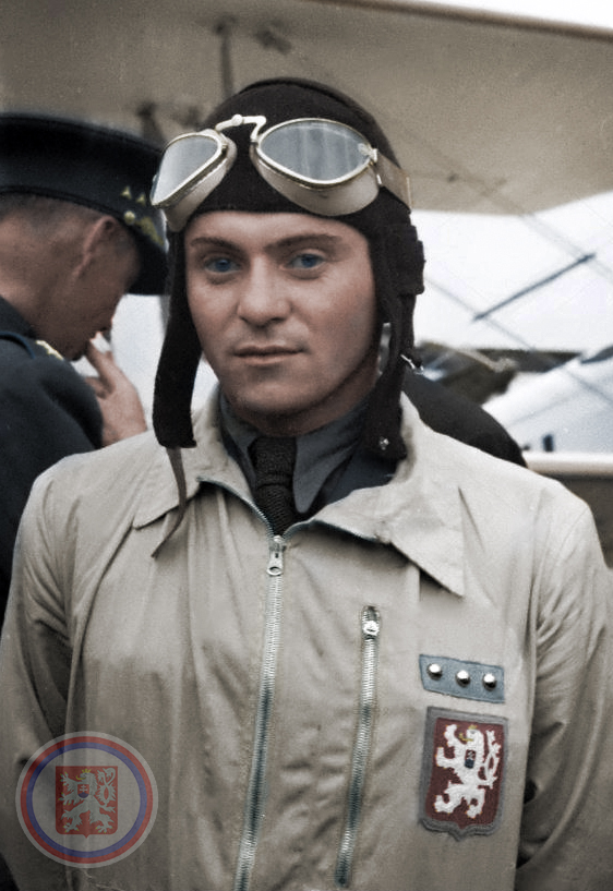 Četař František Peřina na závodech v Curychu; 1937